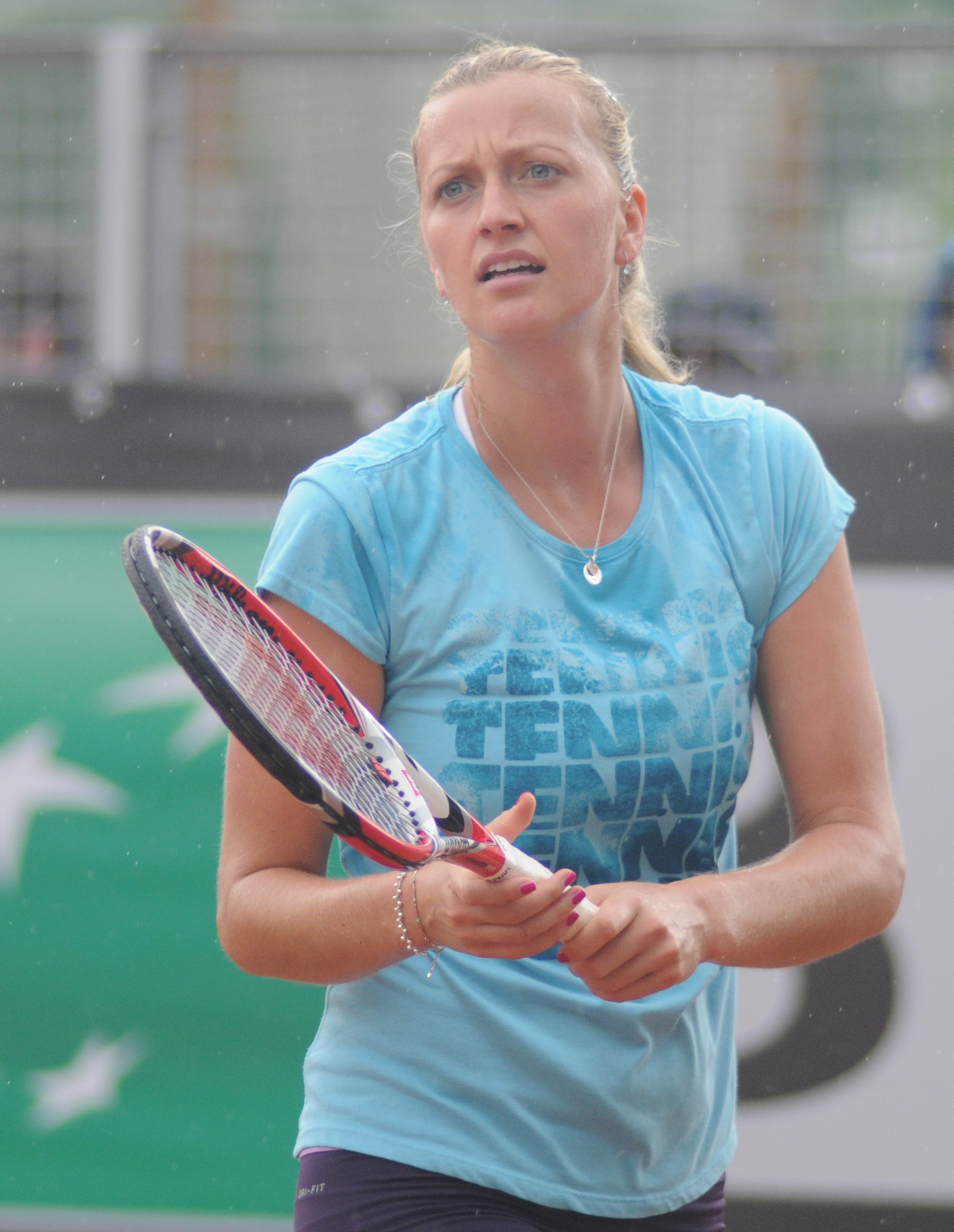 Petra Kvitová at the 2014 Internazionali BNL d'Italia